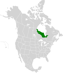 Nizina Hudsońska w przybliżeniu pokrywa się z południowym i wschodnim brzegien Zatoki Hudsona w Ameryce Północnej.